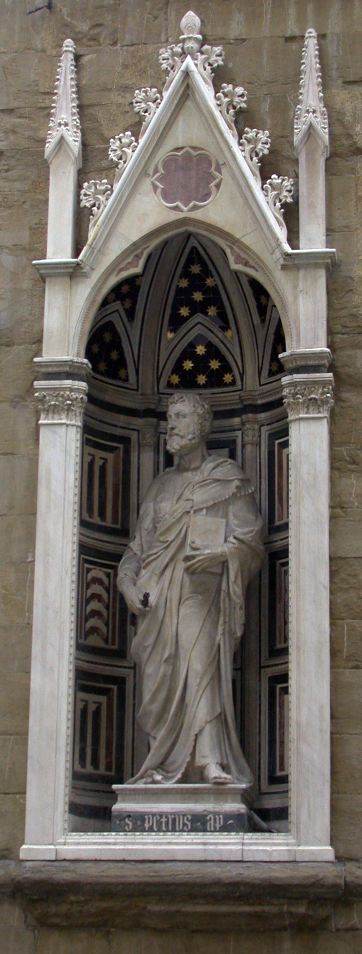 Satue de saint Pierre sur la façade d'Orsanmichele, Florence, Italie